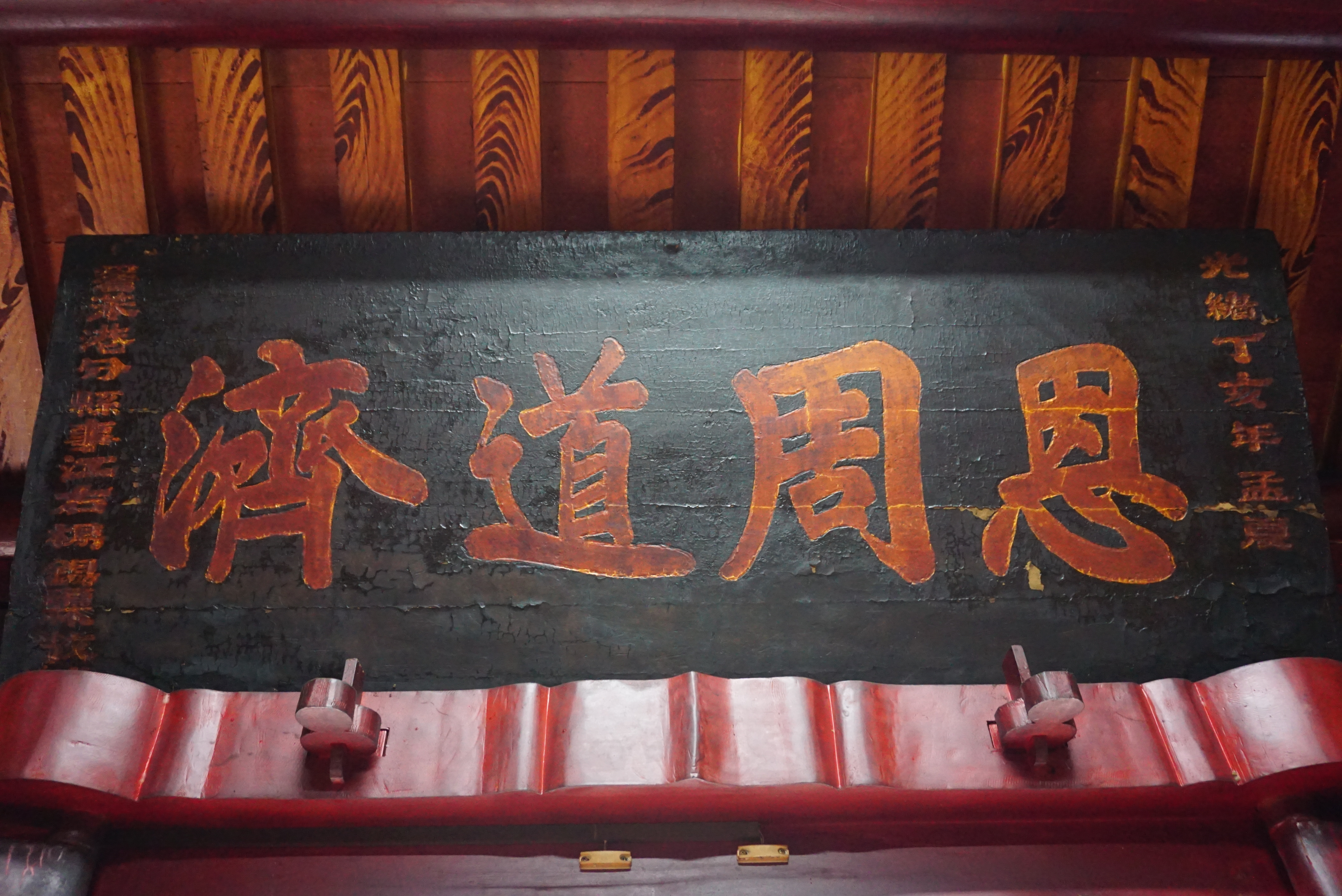 中文（台灣）: 新港大興宮「恩周道濟」古匾，光緒丁亥年孟夏，暑笨港分縣事江右楊錫霖敬酬